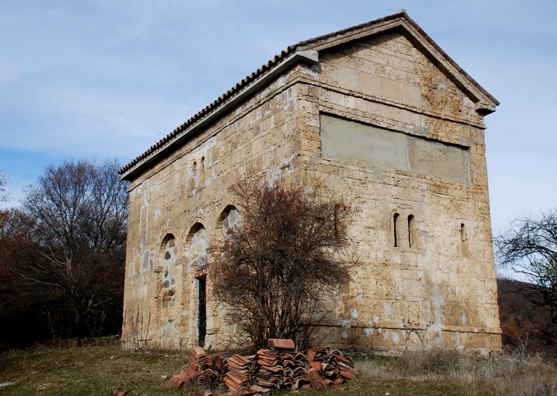 ეკლესია